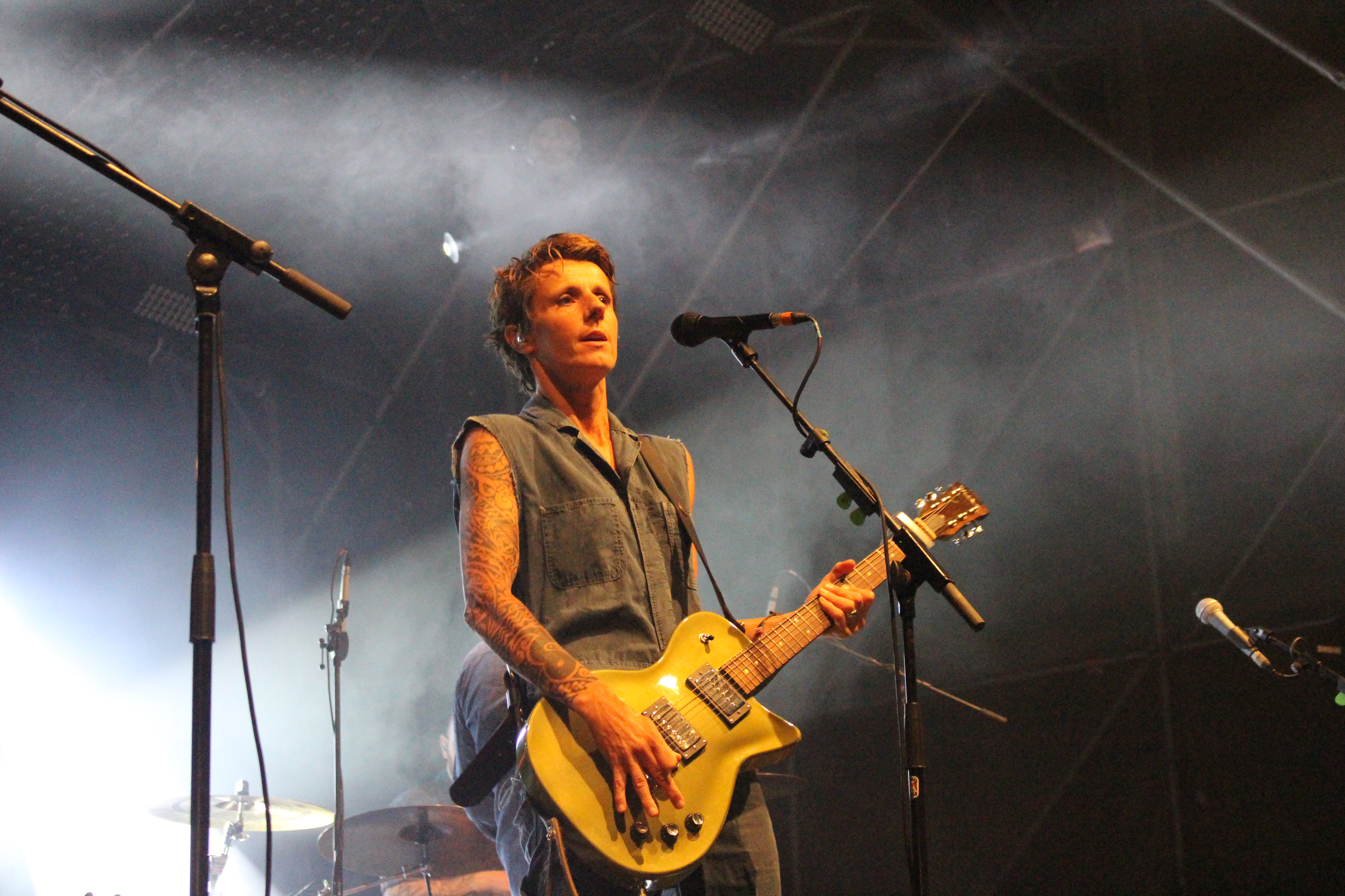 Festivalsommer This photo was created with the support of donations to Wikimedia Deutschland in the context of the CPB project "Festival Summer".